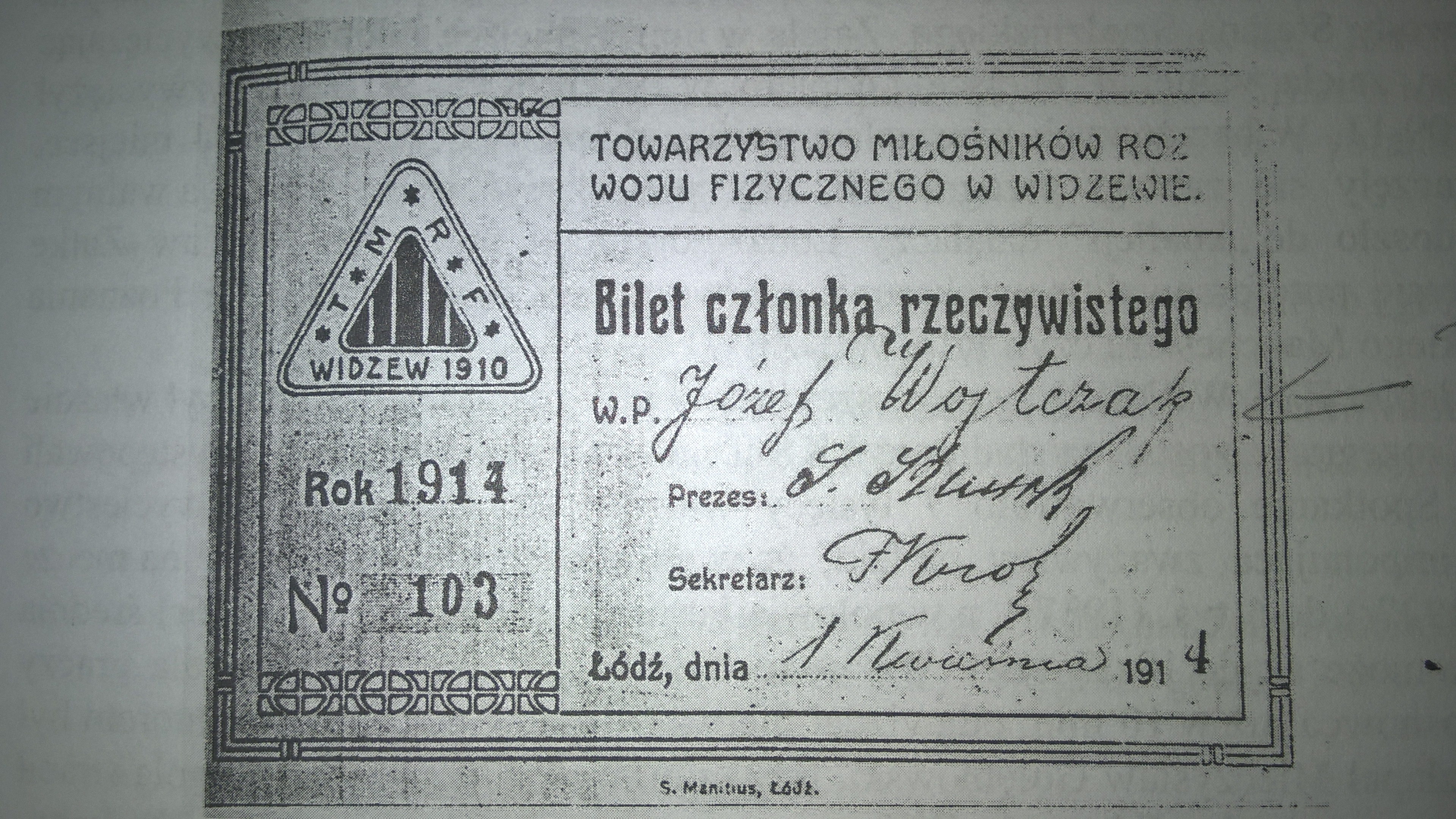 Legitymacja członkowska TMRF Józefa Wojtczaka z 1914 roku